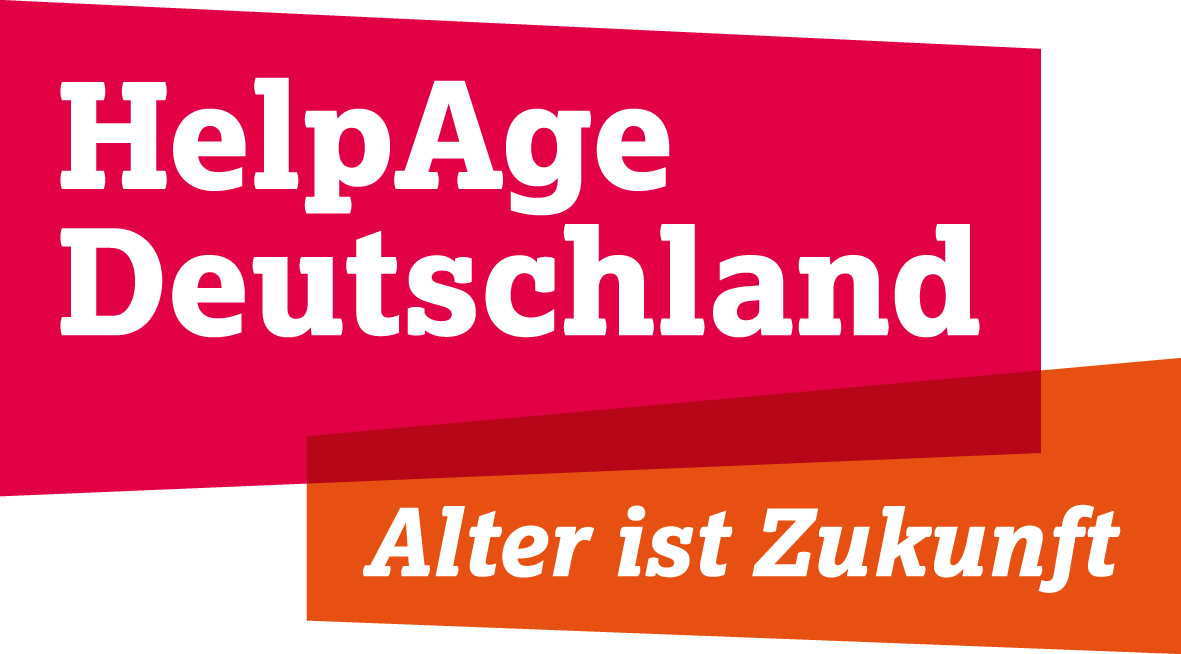 Das Logo von HelpAge Deutschland